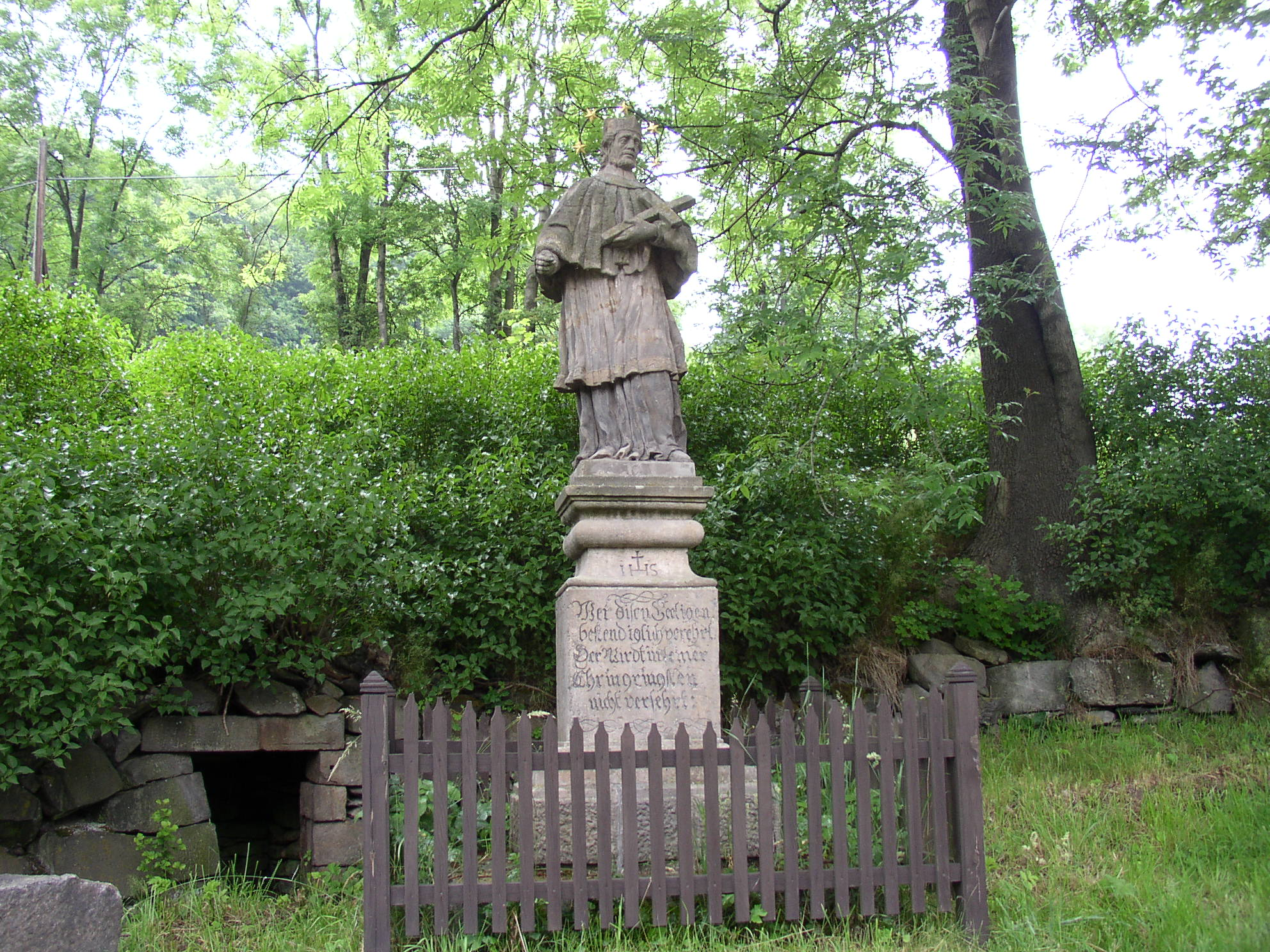 Socha Jana Nepomuckého, Dolní Podluží, okres Děčín, Česká republika